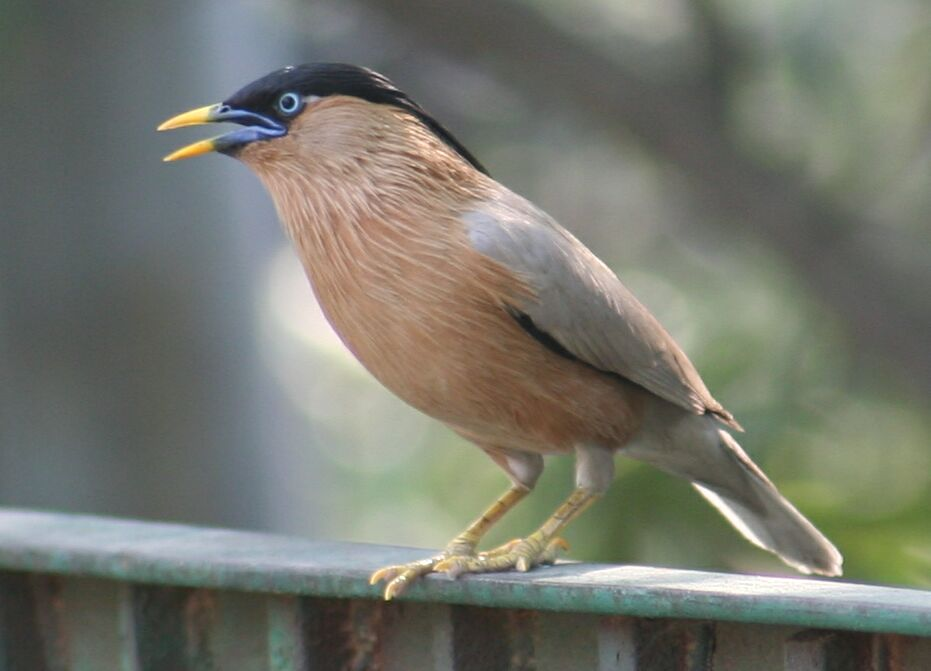 Brahminy Myna, Delhi